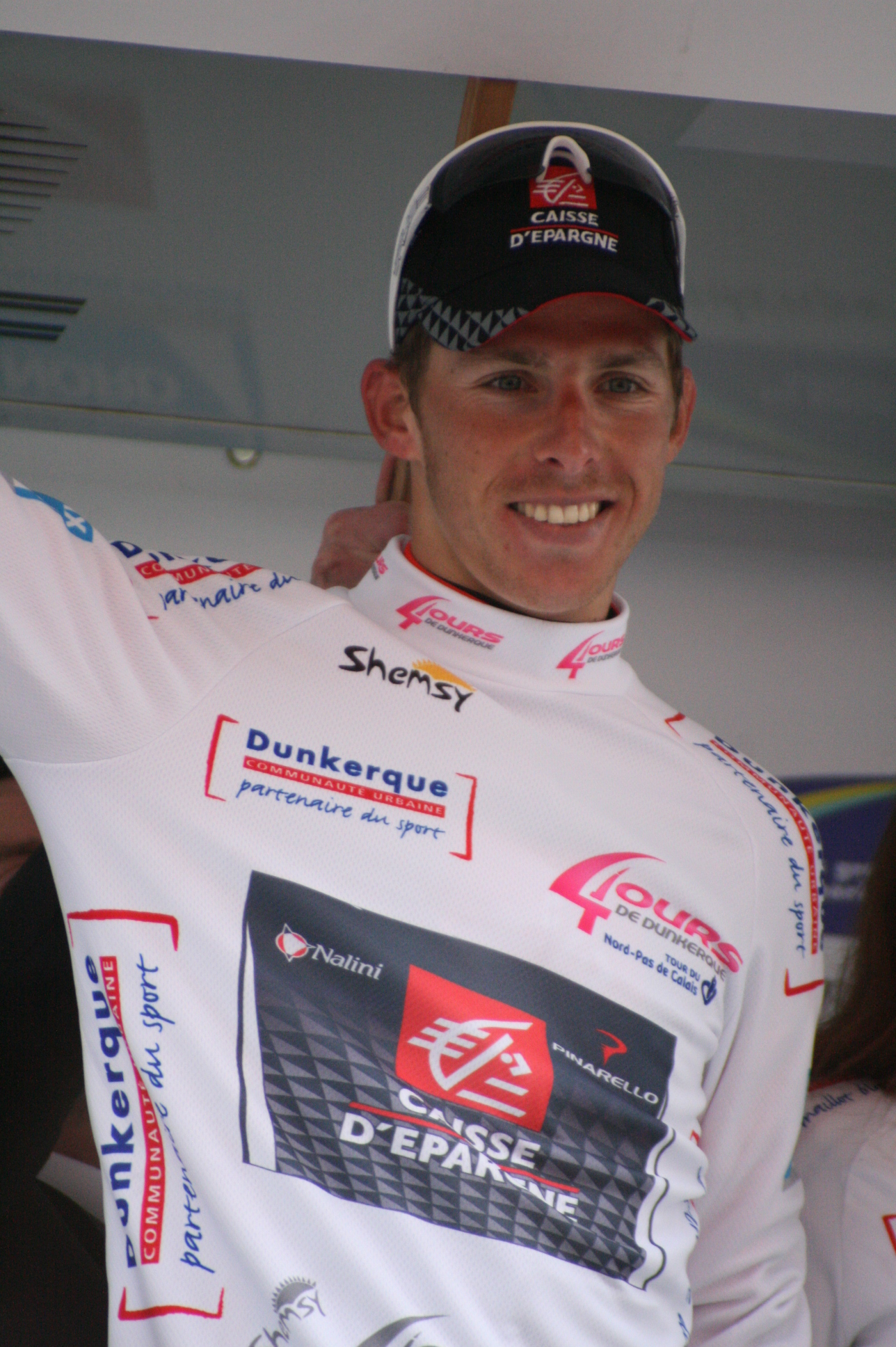 Rui Costa sur le podium de la 5e étape des Quatre jours de Dunkerque 2010